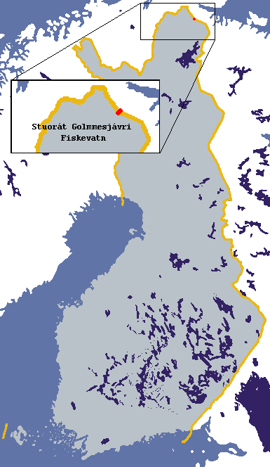 Stuorát Golmmesjávrin sijainti Suomen ja Norjan rajalla * Sjöns Stuorát Golmmesjávri läge vid den finska och norska gränsen * Location of lake Stuorát Golmmesjávri at the Finnish amd Norwegian border